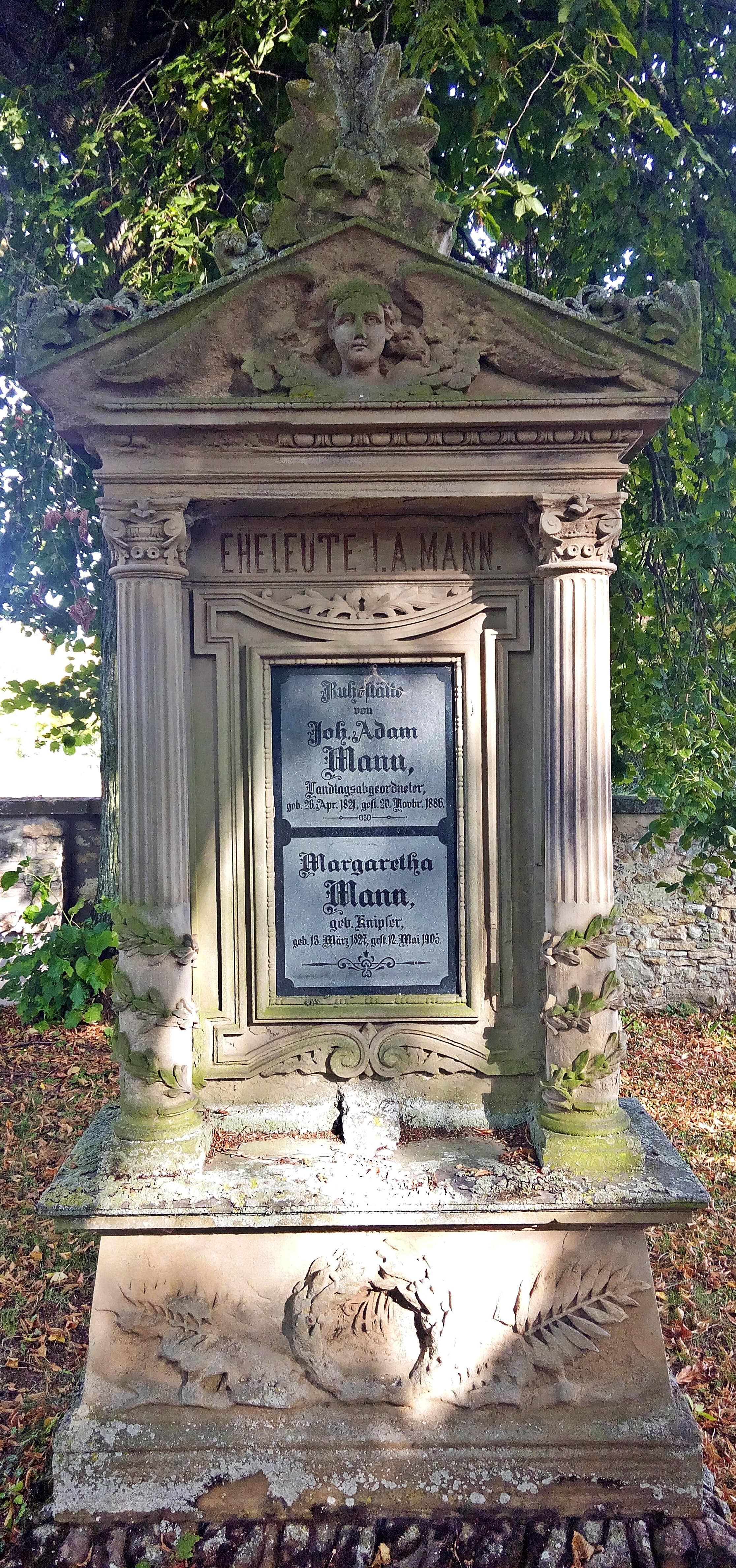 Friedhof Lautersheim, Grabmal des bayerischen Landtagsabgeordneten Johann Adam Mann (1821-1886)